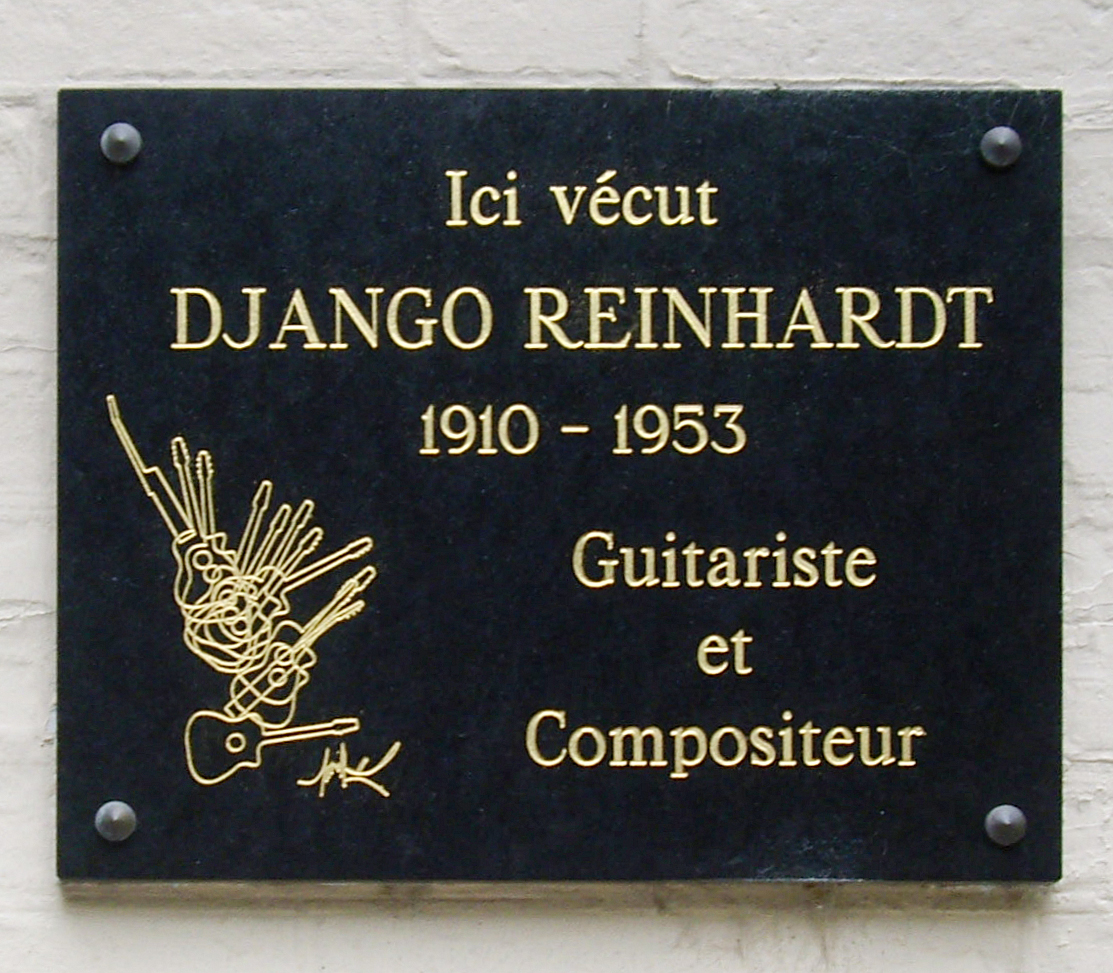 Plaque commémorative, 6 avenue Frochot, Paris 9e. « Ici vécut Django Reinhardt, 1910-1953, guitariste et compositeur. »